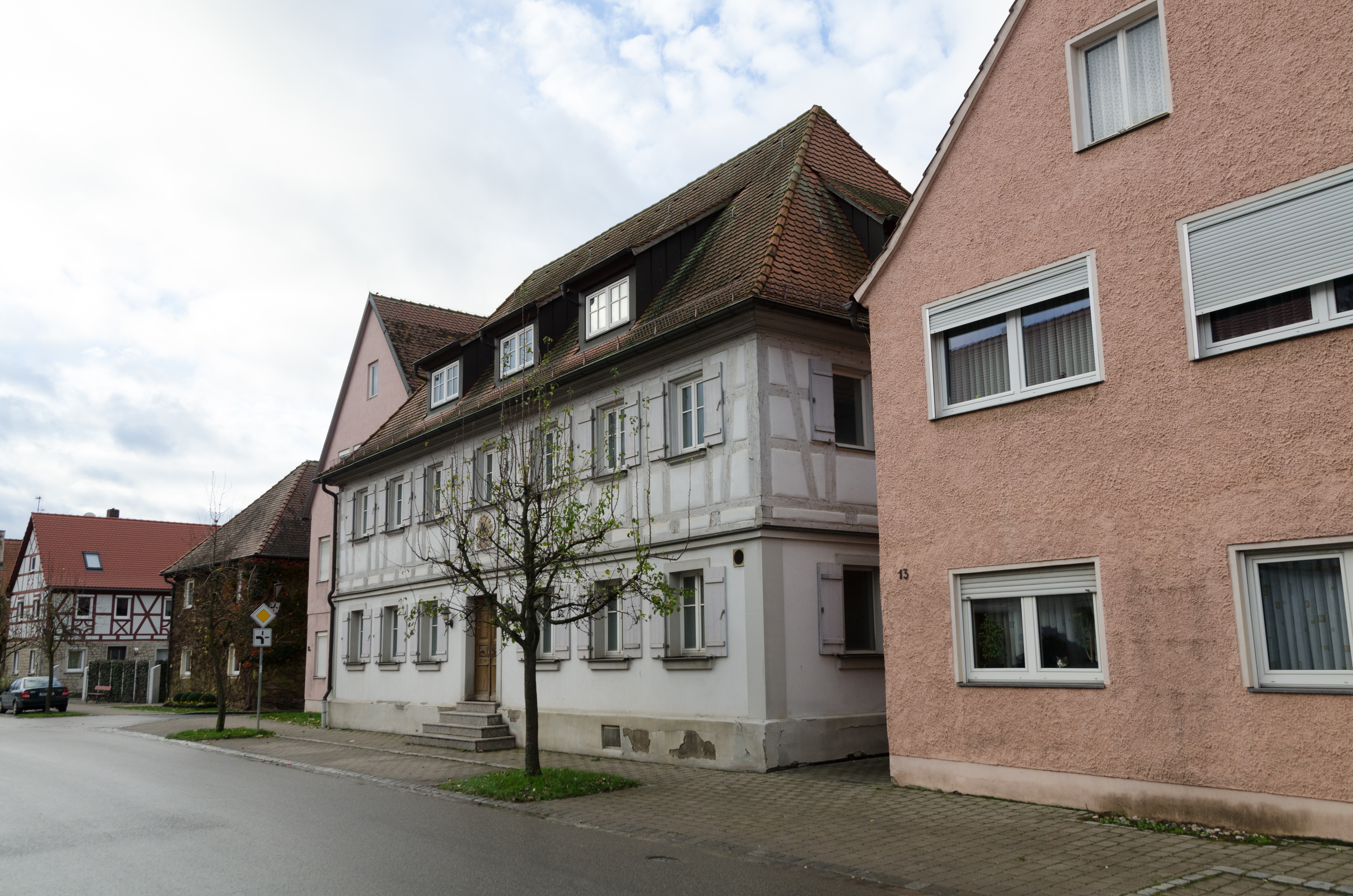 Marktbergel, Würzburger Straße 11a